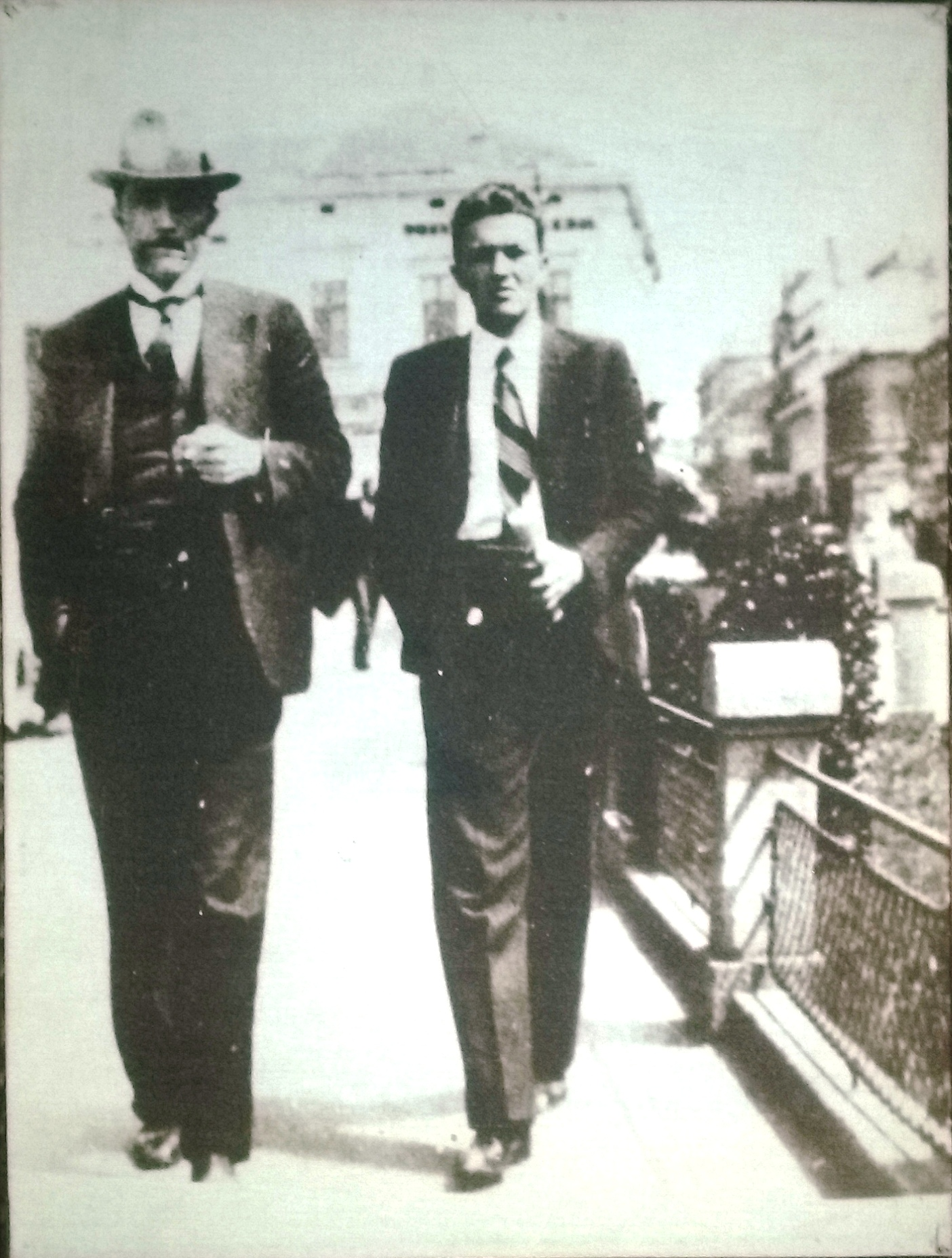 Фотографија Жикице Јовановића Шпанца из сталне поставке Музеја 7. јули 1941. у Белој Црви, код Крупња.